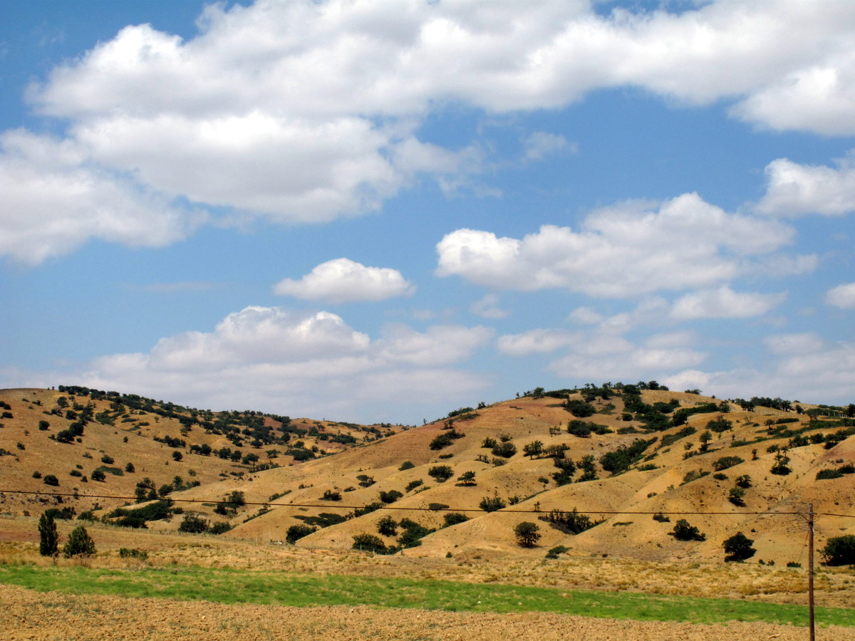 Drive Ankara to Cappadocia